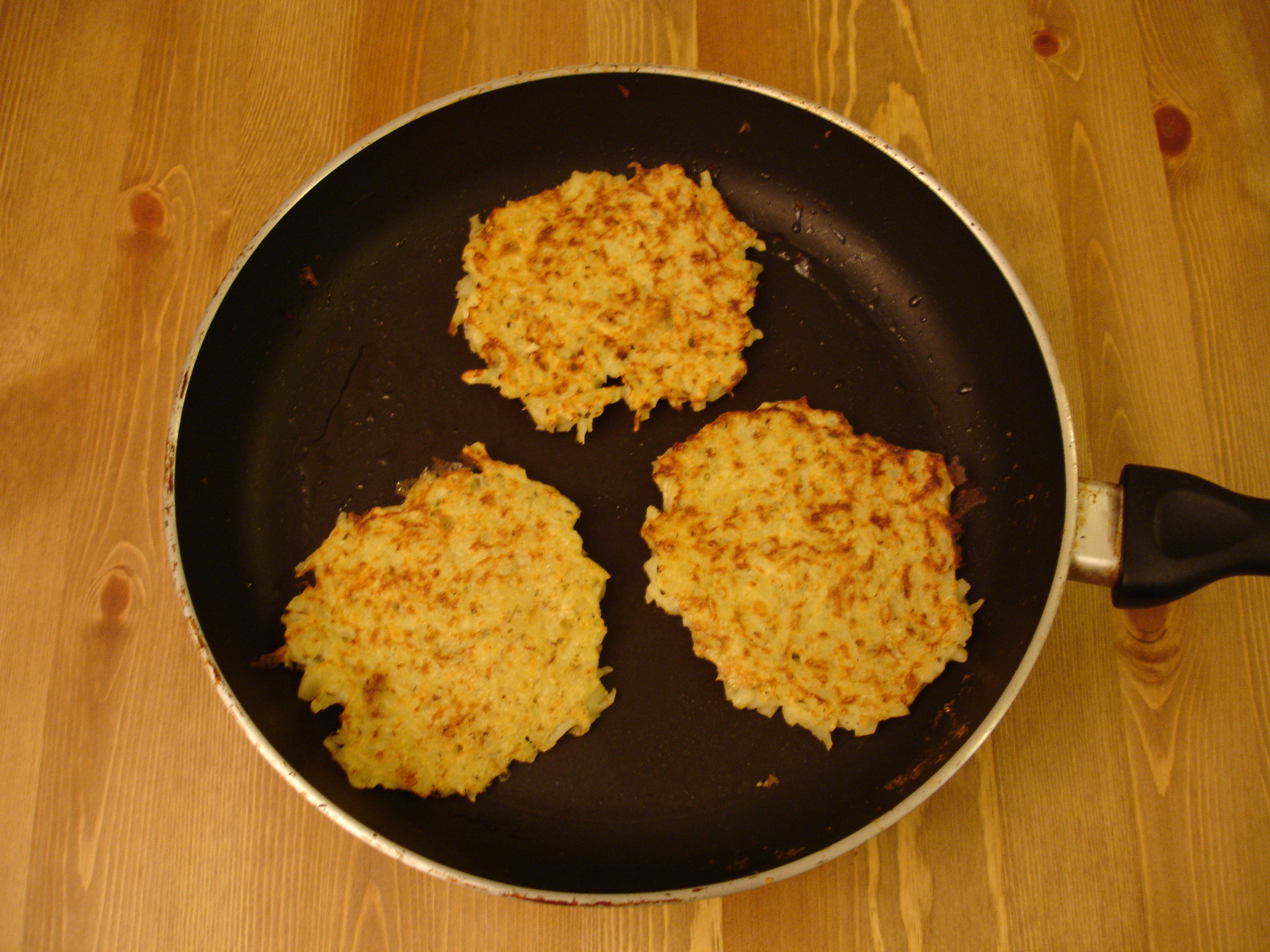 Galettes de pommes de terre / Potato pancakes / Kartoffelpuffer